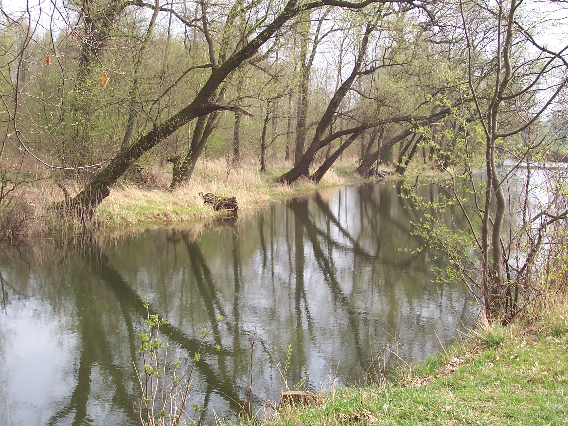 Toter Nebenarm der Mulde im Auengebiet Lübbisch zwischen Eilenburg und Hainichen